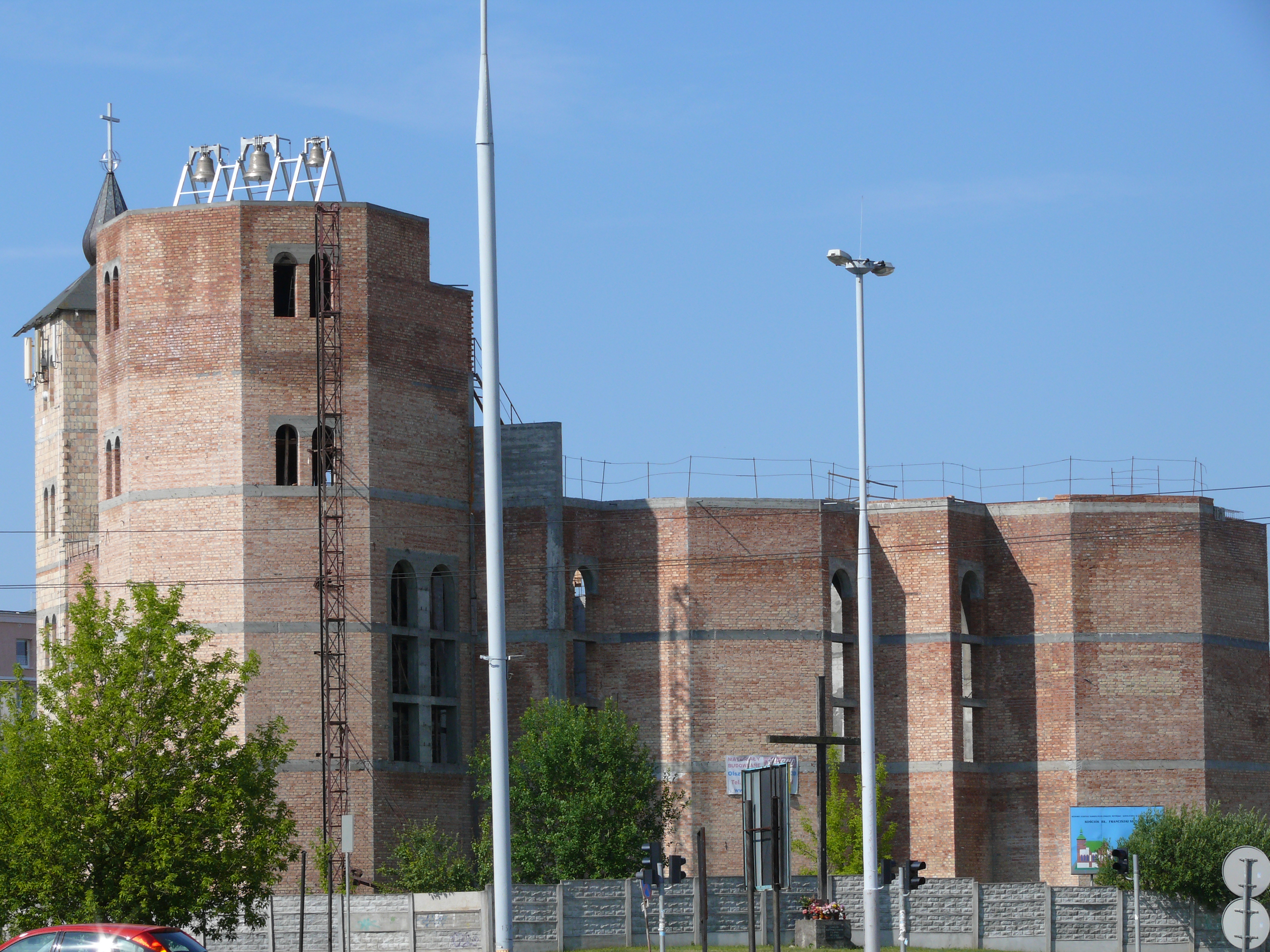 Budowa kościoła pw. Błogosławionej Franciszki Siedliskiej w Olsztynie